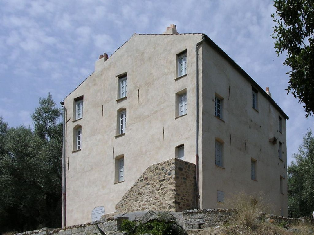 Ajaccio. Maison des Milelli. Maison des Bonaparte dans laquelle Bonaparte aurait lors de son dernier jour du séjour en Corse de 1791, avant son retour à Auxonne, rédigé sa lettre à Matteo Buttafoco. Monument historique.